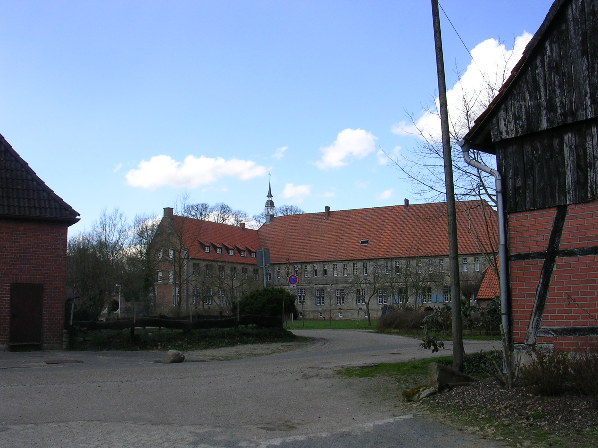 Blick auf das Klostergebäude Frenswegen, Nordhorn, Niedersachsen, Deutschland